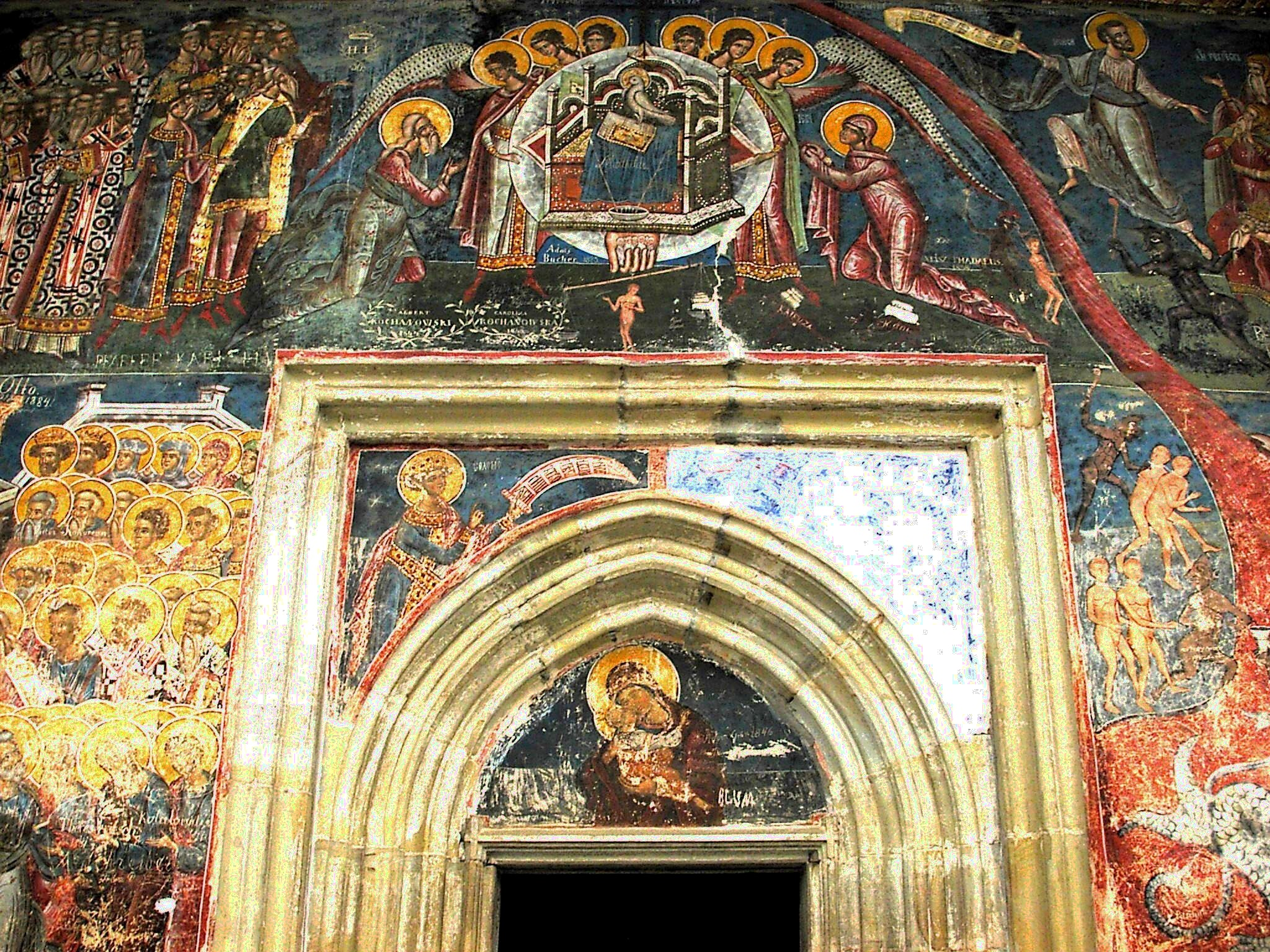 Külső falfestmény a humori kolostor falán (Románia)